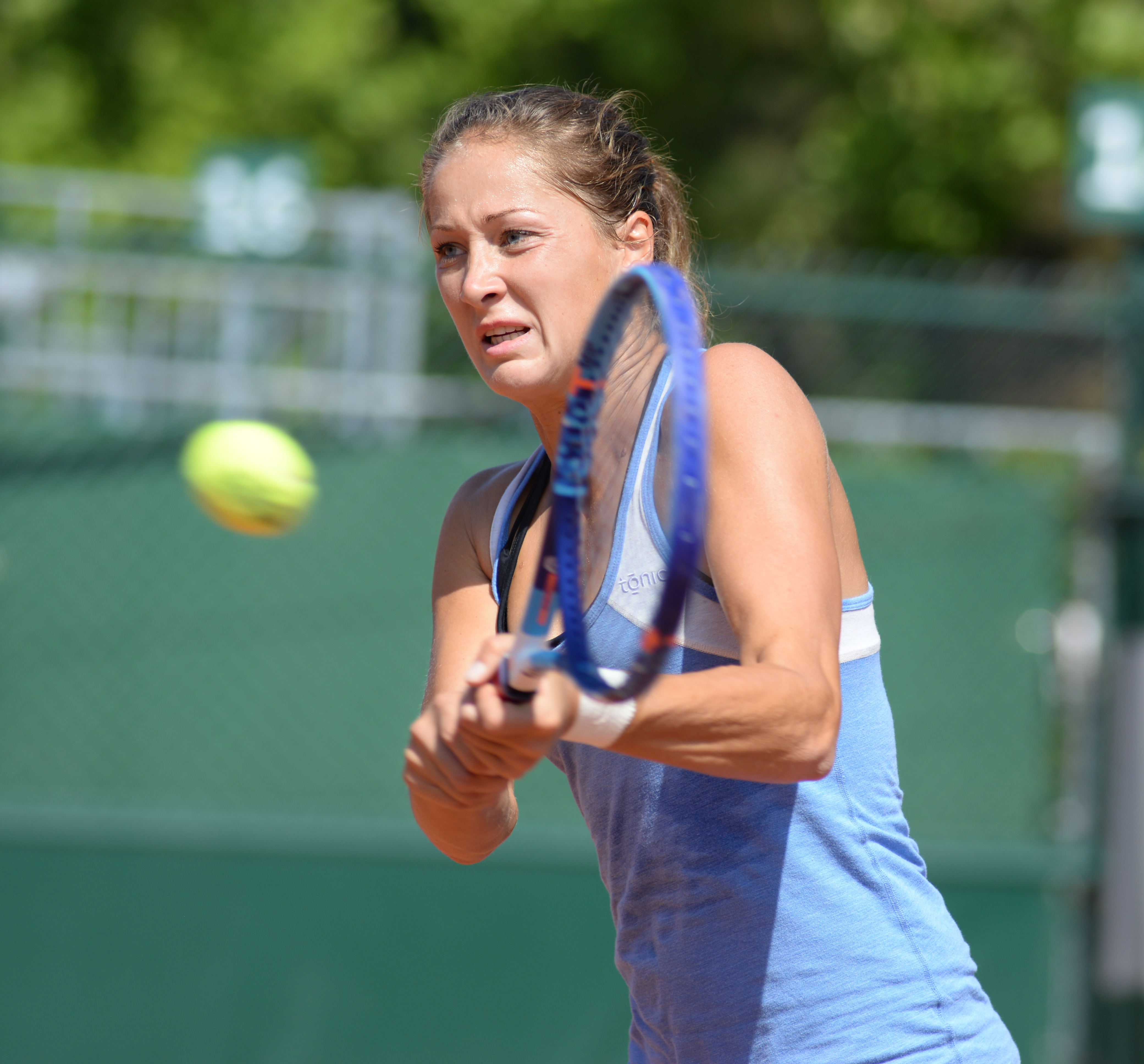 Bojana Jovanovski